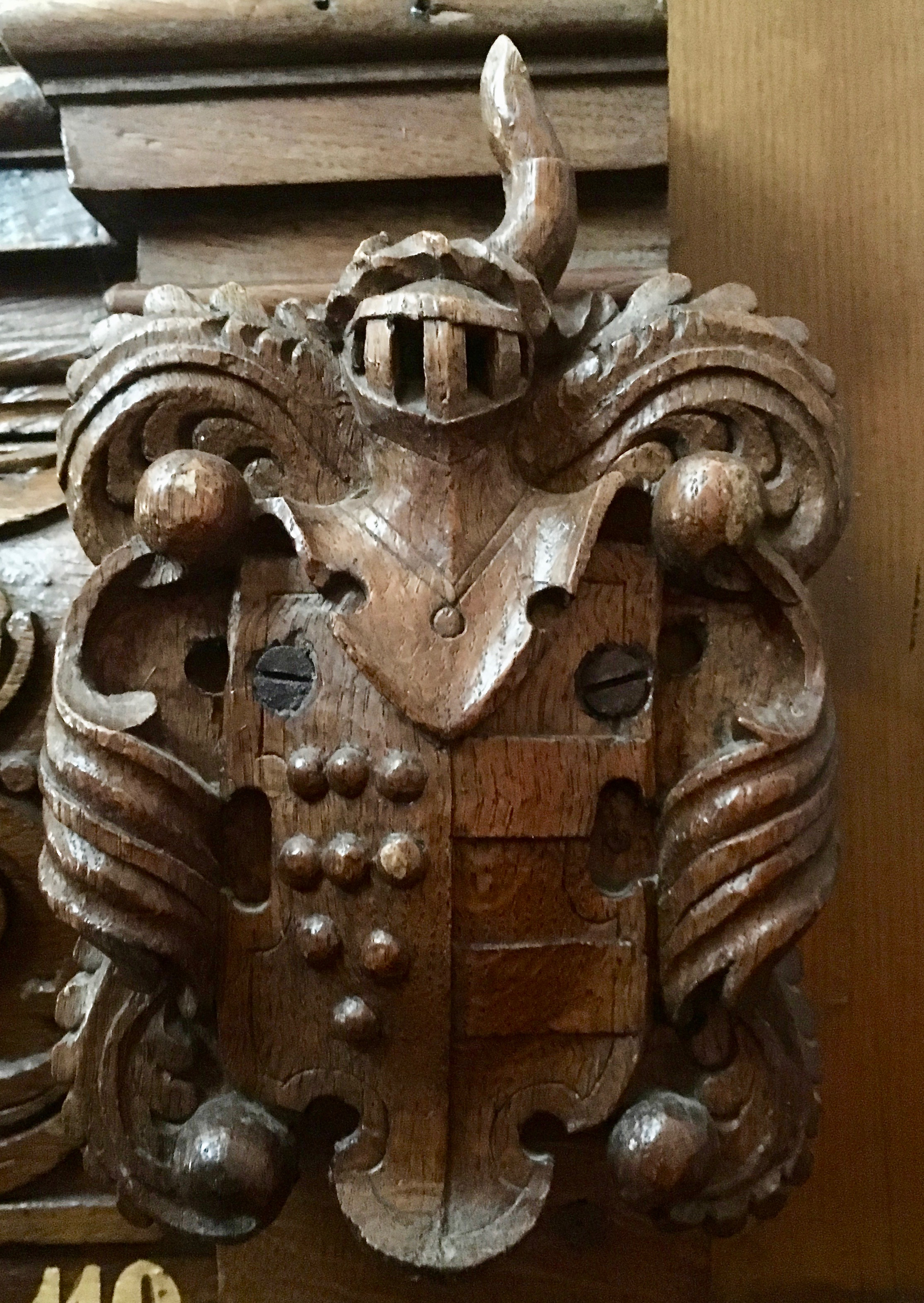 Christoffer Krafses våbenskjold i Vellerup Kirke, Hornsherred, Sjælland